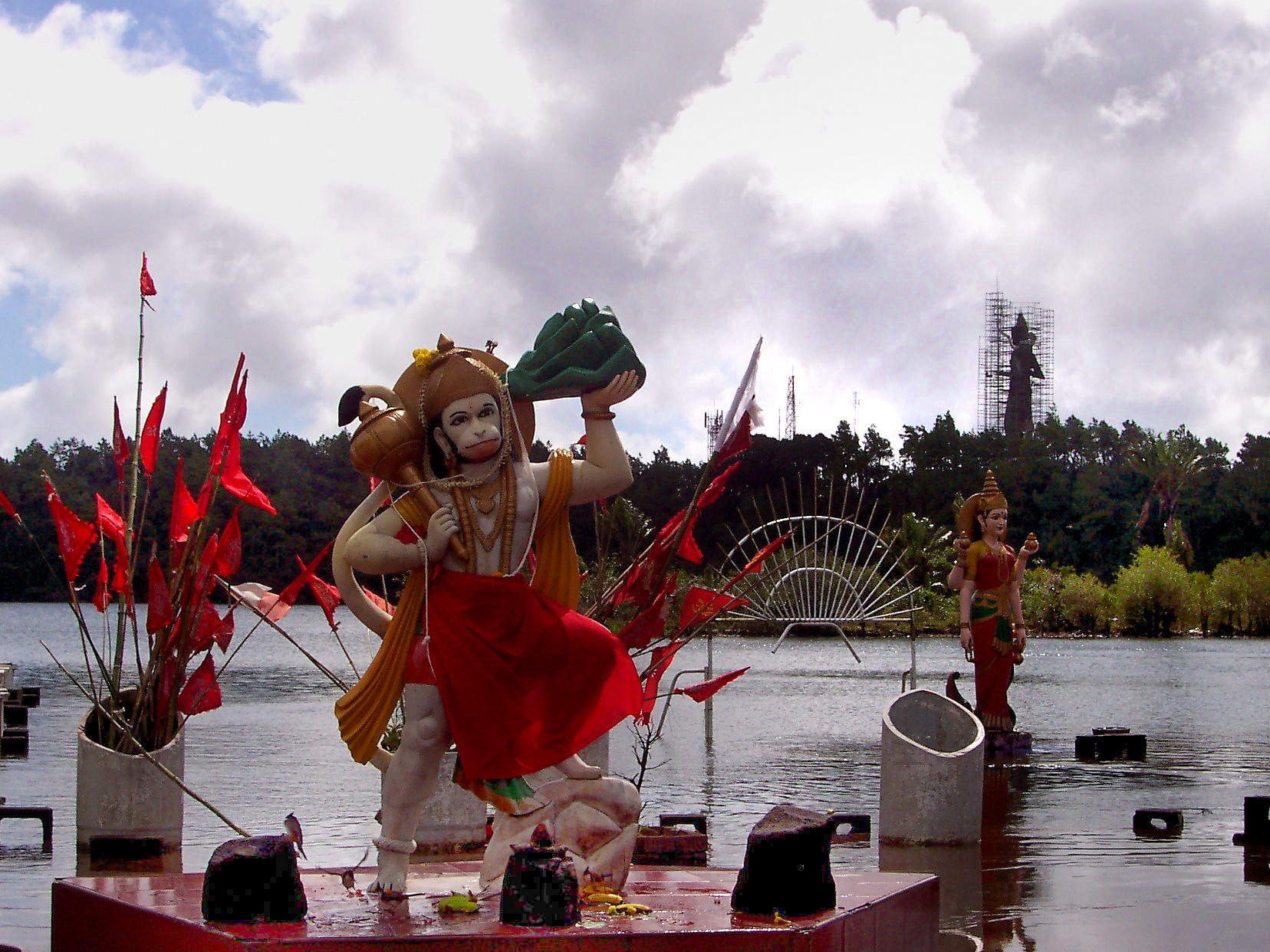 Vue du lac de Grand Bassin pendant le Mahashivatri